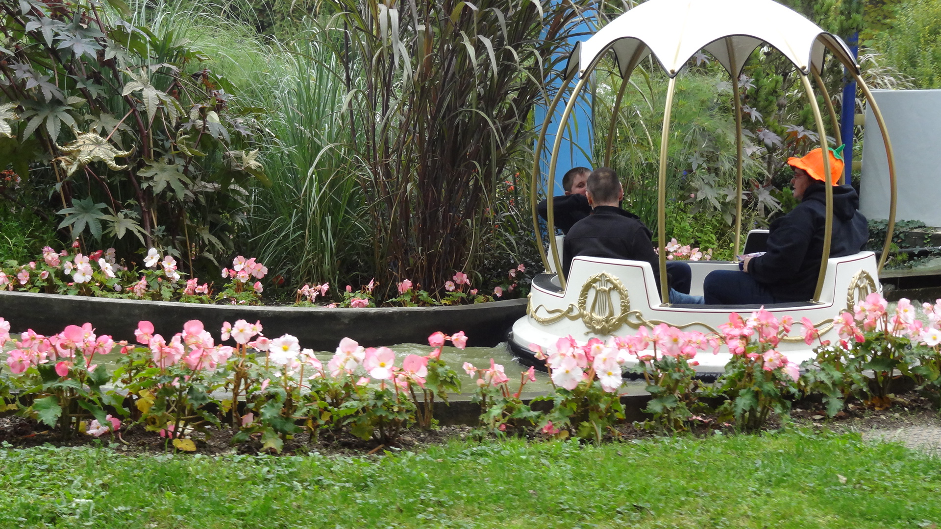 Rivière enchantée